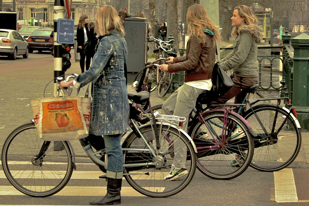 Las tres ciclistas